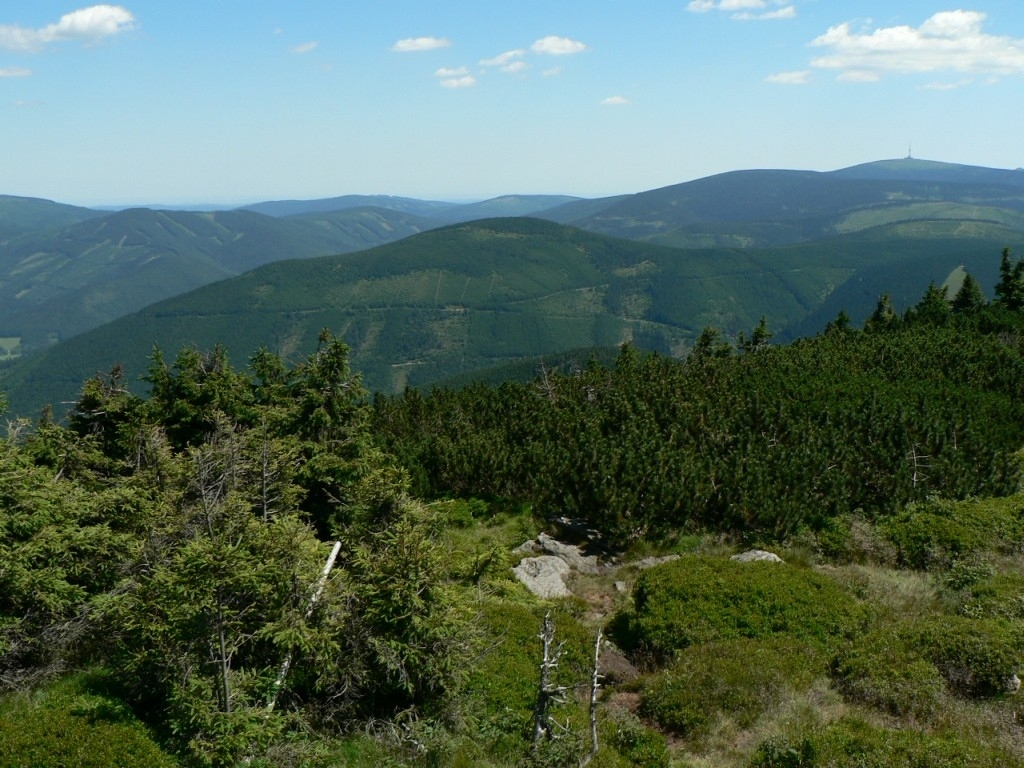 Pohled z Červené hory na Velký Klín (1178 m, v popředí).